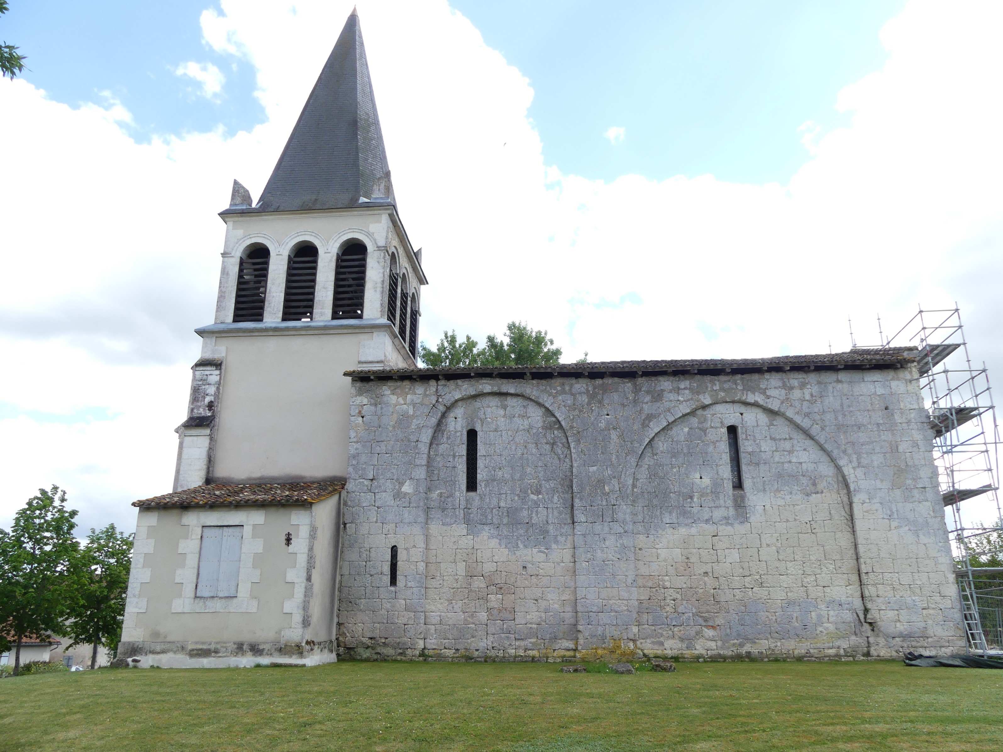 L'église de La Jemaye, Dordogne, France.